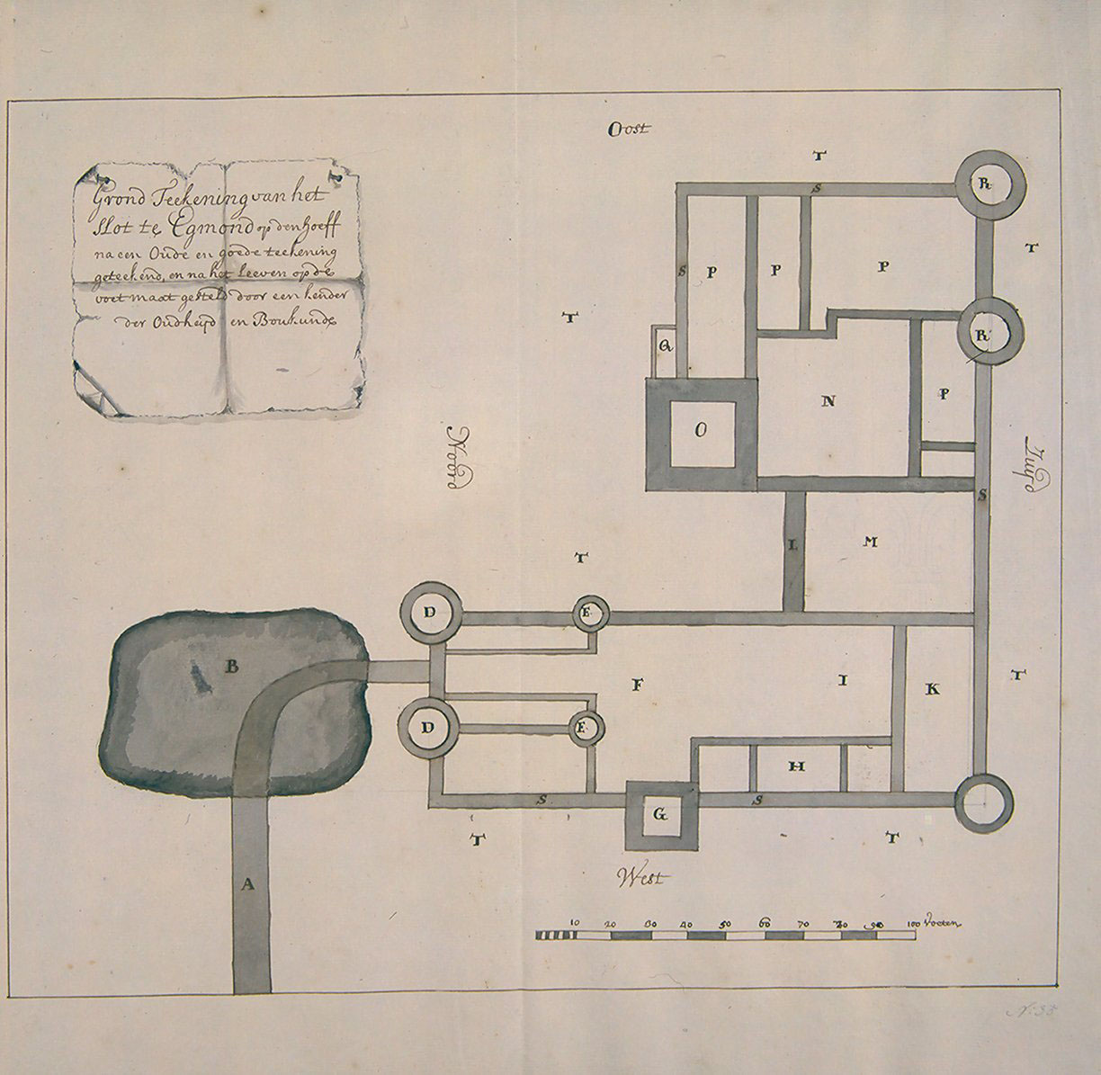 De Kasteelen in het eerste gedeelte van de gezigten van Amsterdam zijn door Gerrit Schoemaker (1692–1736) Alternative namesGerrit SchoemakerDescriptionDutch textile merchant and draughtsmanDate of birth/death16921736Location of birth/deathAmsterdamAmsterdamWork periodAmsterdamAuthority control : Q30303228 VIAF: 37300258 RKD: 363207 geteekend, de overige gezigten van Amsterdam zijn door diens vader Andries Schoemaker geteekend en een paar naar Cornelis Pronk